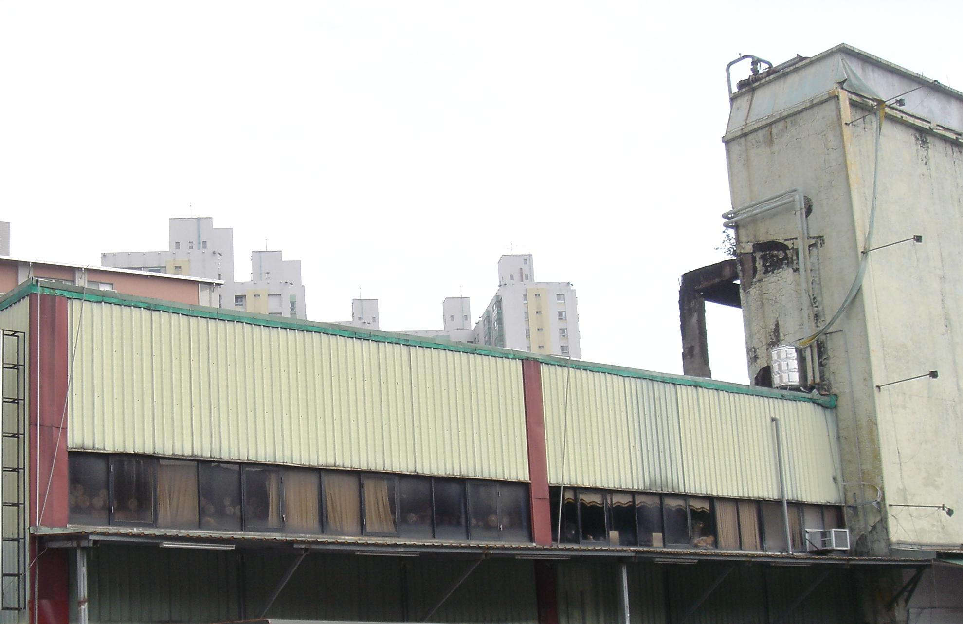 台北縣中和市自強保齡球館遺跡